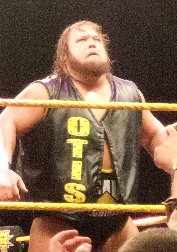 P_20170419_185227_002